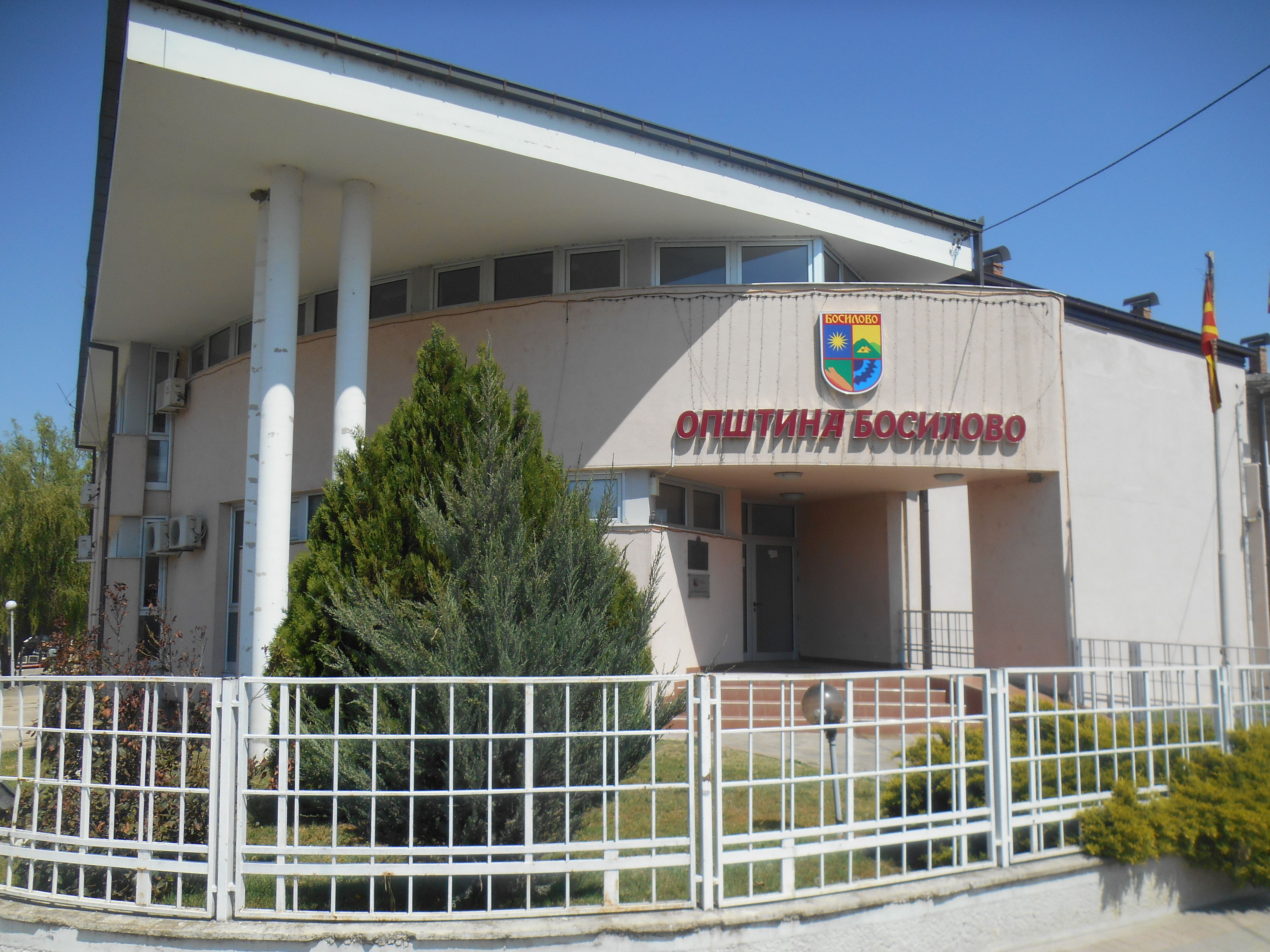 Административна зграда на Општина Босилово